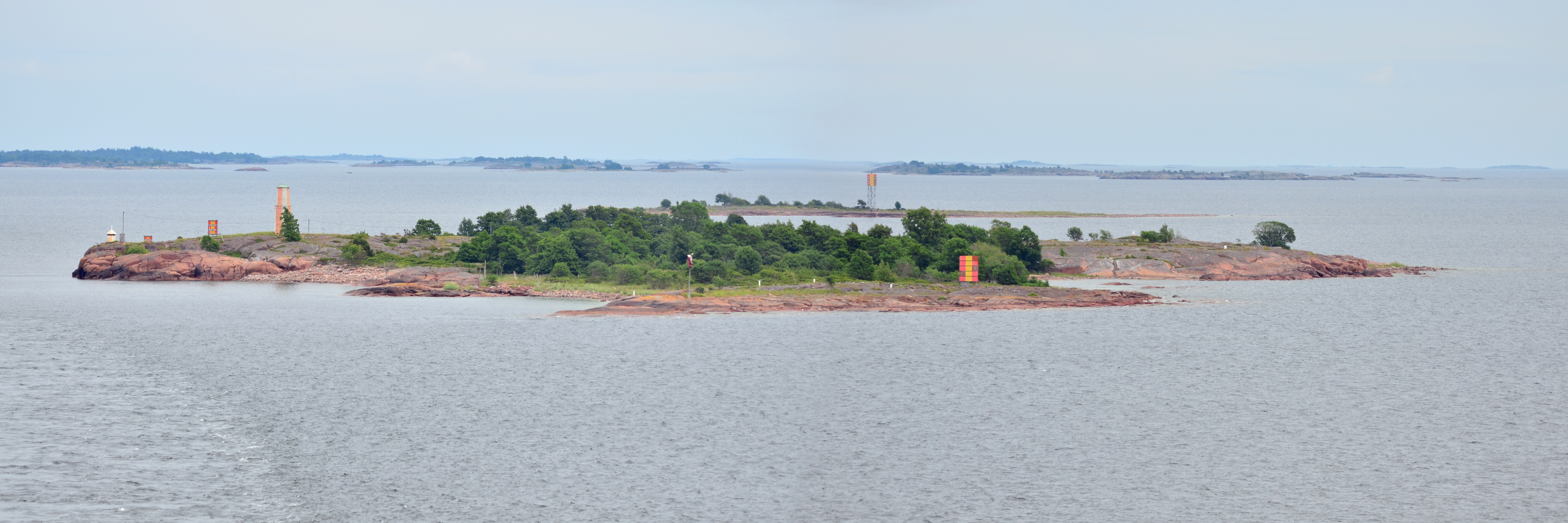 Ön Ledskär i Ålands skärgård.